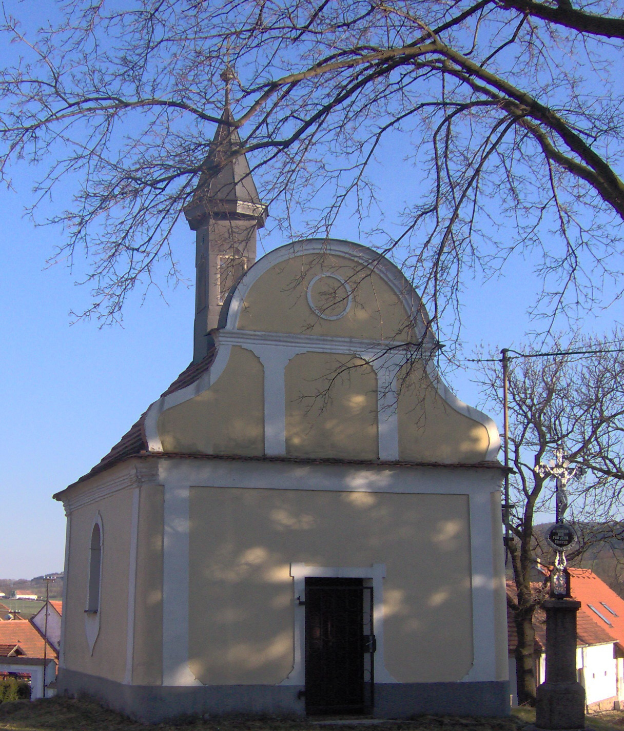 Chapel in Novosedly, Strakonice District, Czech republic - kaple v Novosedlech v okrese Strakonice